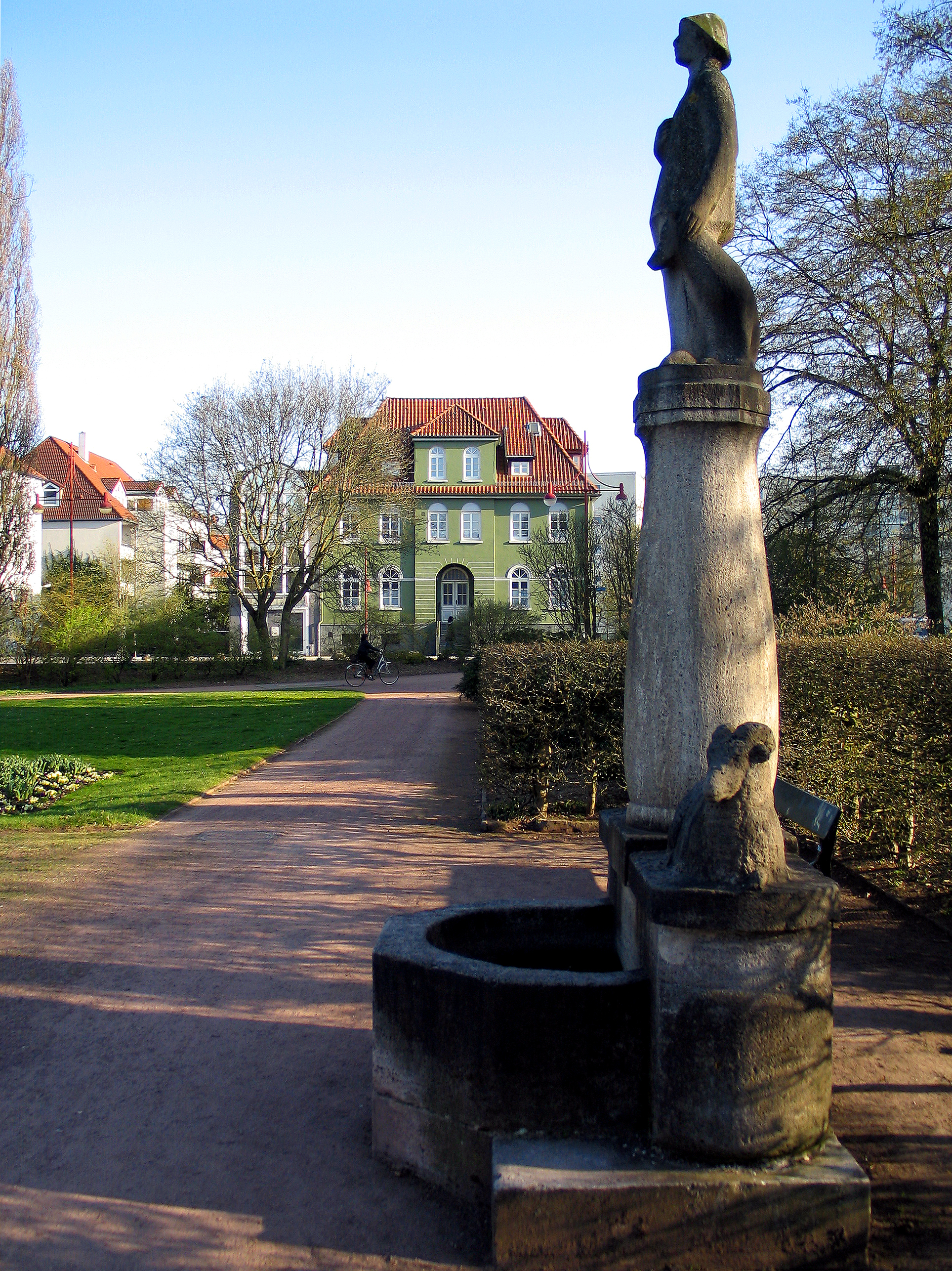 Laut der E-Mail-Antwort der Stadt Celle vom 30. April 2013 (Vanessa Hartung) wurde diese "Schäferfigur an einem Brunnen" der Bildhauerin "Gerda Hotzen-Sautter" (siehe Gerda Sautter de Hotzen) 1955 in den Trift-Anlagen aufgestellt. Unentschlüsselt blieb bisher noch (Stand: 05/2013) die vollständige Inschrift auf der Rückseite der nicht (mehr ?) in Betrieb befindlichen Brunnenschale aus Muschelkalk; jedoch konnte der Fotograf zum Zeitpunkt der Aufnahme den Teil-Text "... Senator August Haake" entziffern. Hier ist die Skulptur mit Schäfer, Schäferhund und zwei Schafen zu sehen mit Blick in Richtung Bahnhofstraße ... Zufügung von Peterindelft: Die Text am der Rückseite lautet: "zum 25 jahr amtsjubiläum der oberbürgermeisters denicke 9 nov? 1912 der stadt celle gestiftet von senator albert haacke" und Bildhauersignatur ist B. Frida?